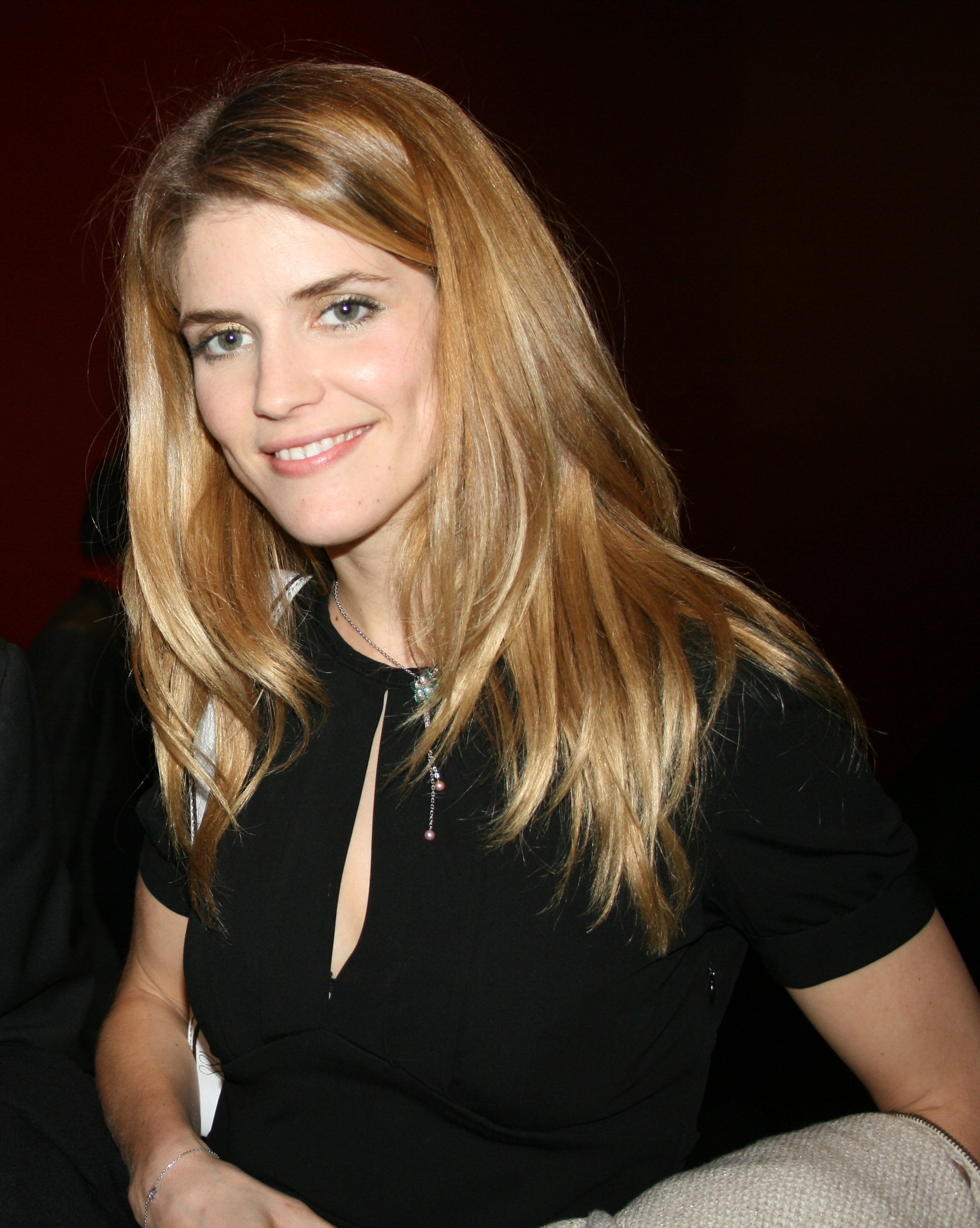 Alice Taglioni à l'avant-première de Notre univers impitoyable diffusée à l'UGC Ciné Cité Les Halles, à Paris.